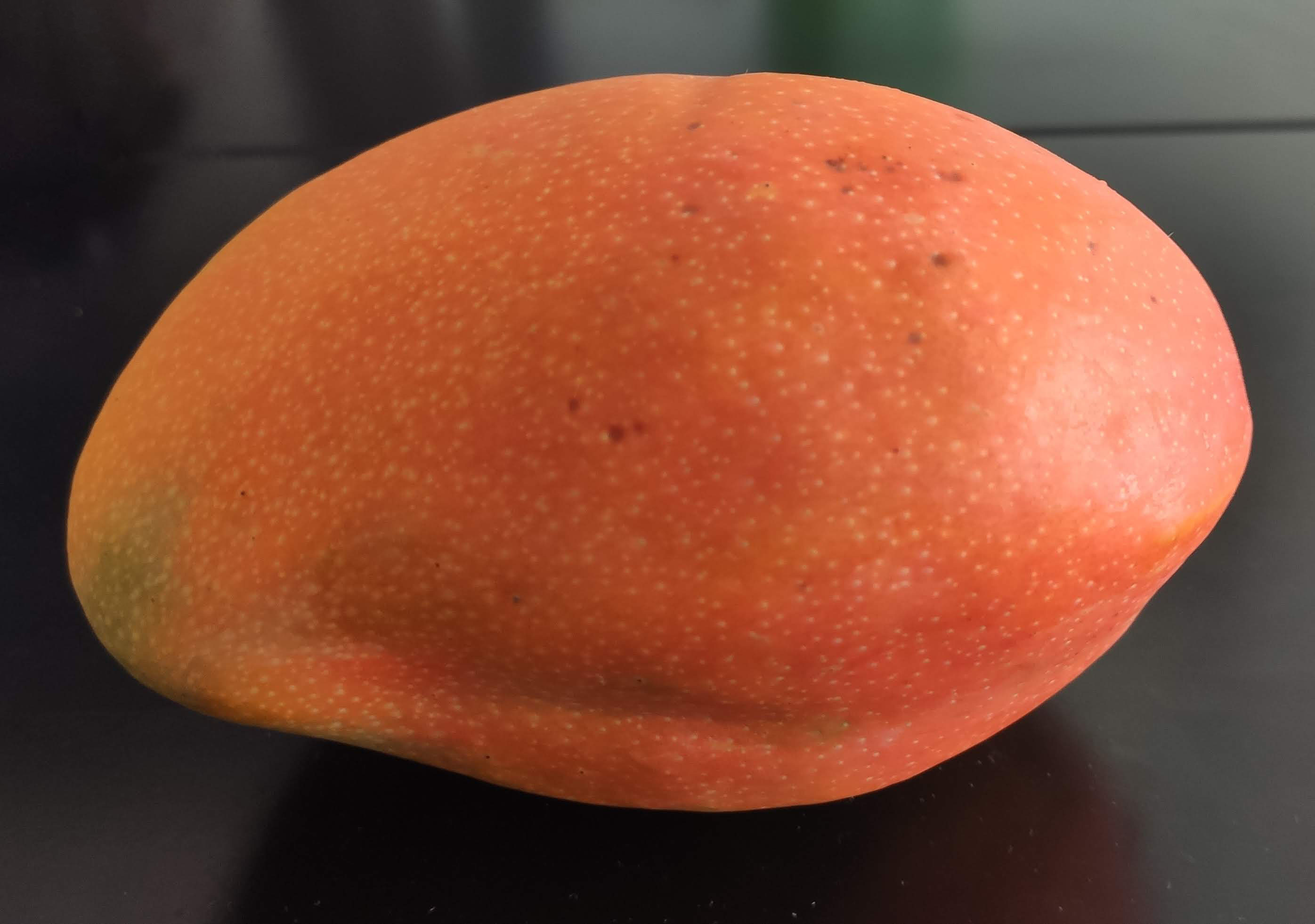 Mango